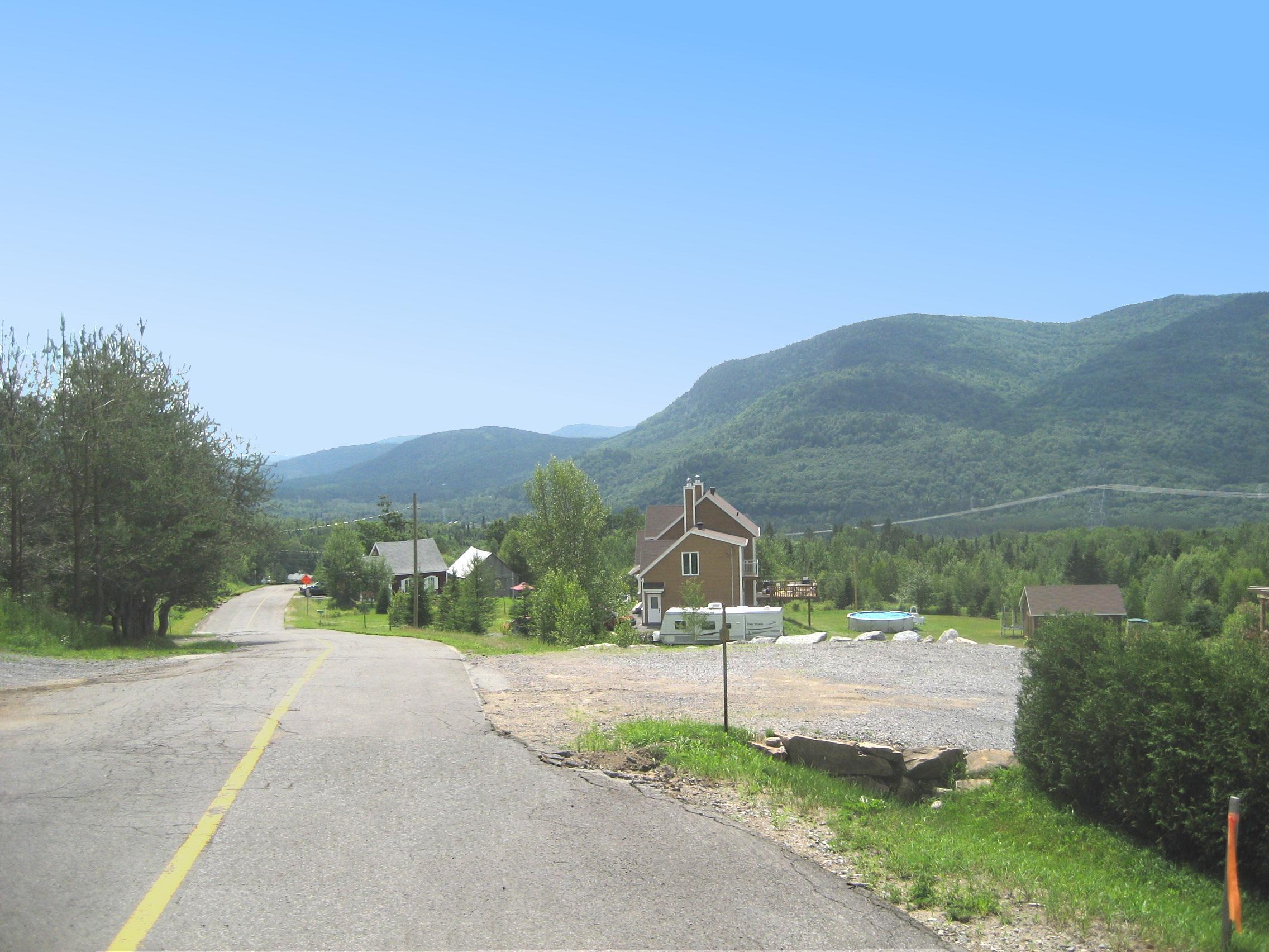 Chemin Presqu'ile à St-Adolphe Stoneham, Québec, Canada